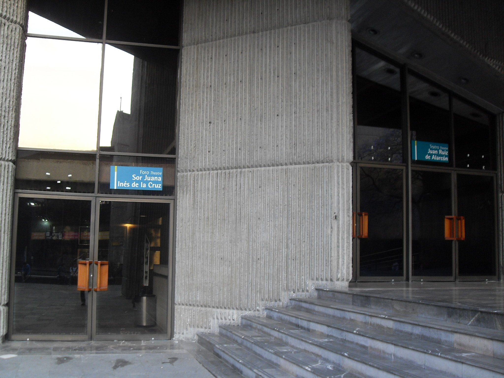 Teatro Juan Ruiz de Alarcón y Foro Sor Juana Inés de la Cruz.